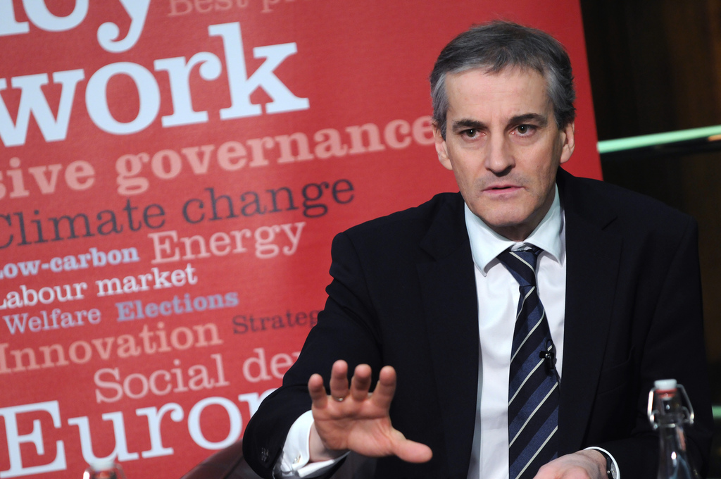 Jonas Gahr Store